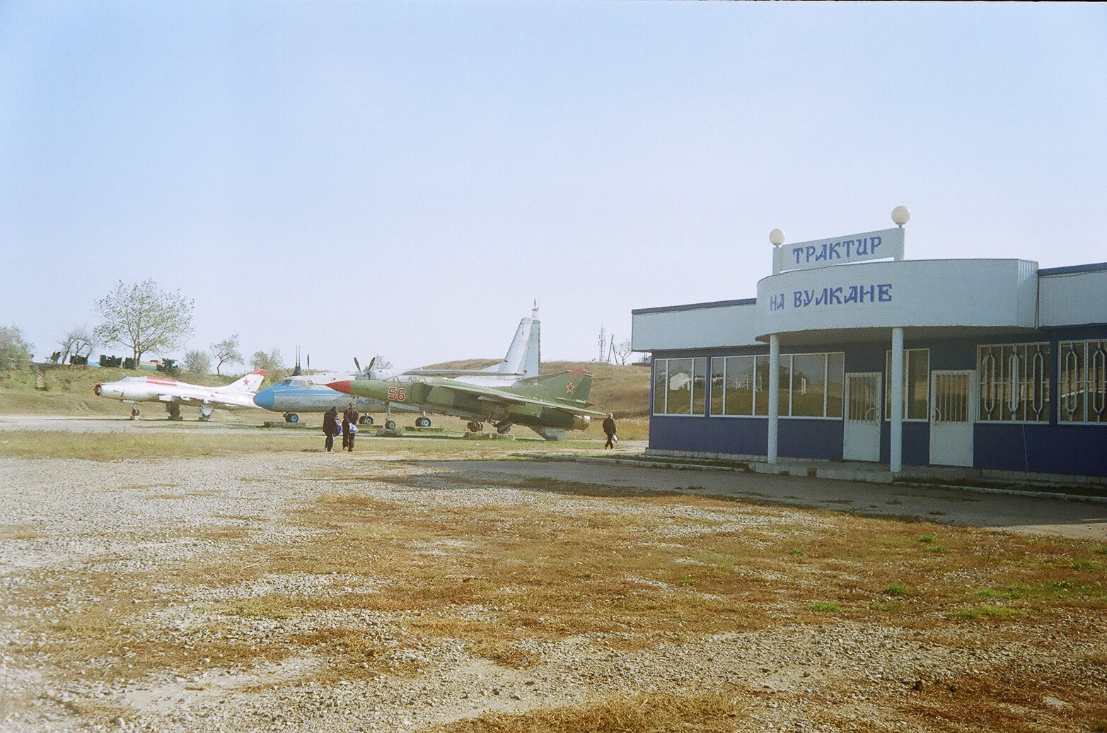 г.Темрюк. Трактир у входа в музей